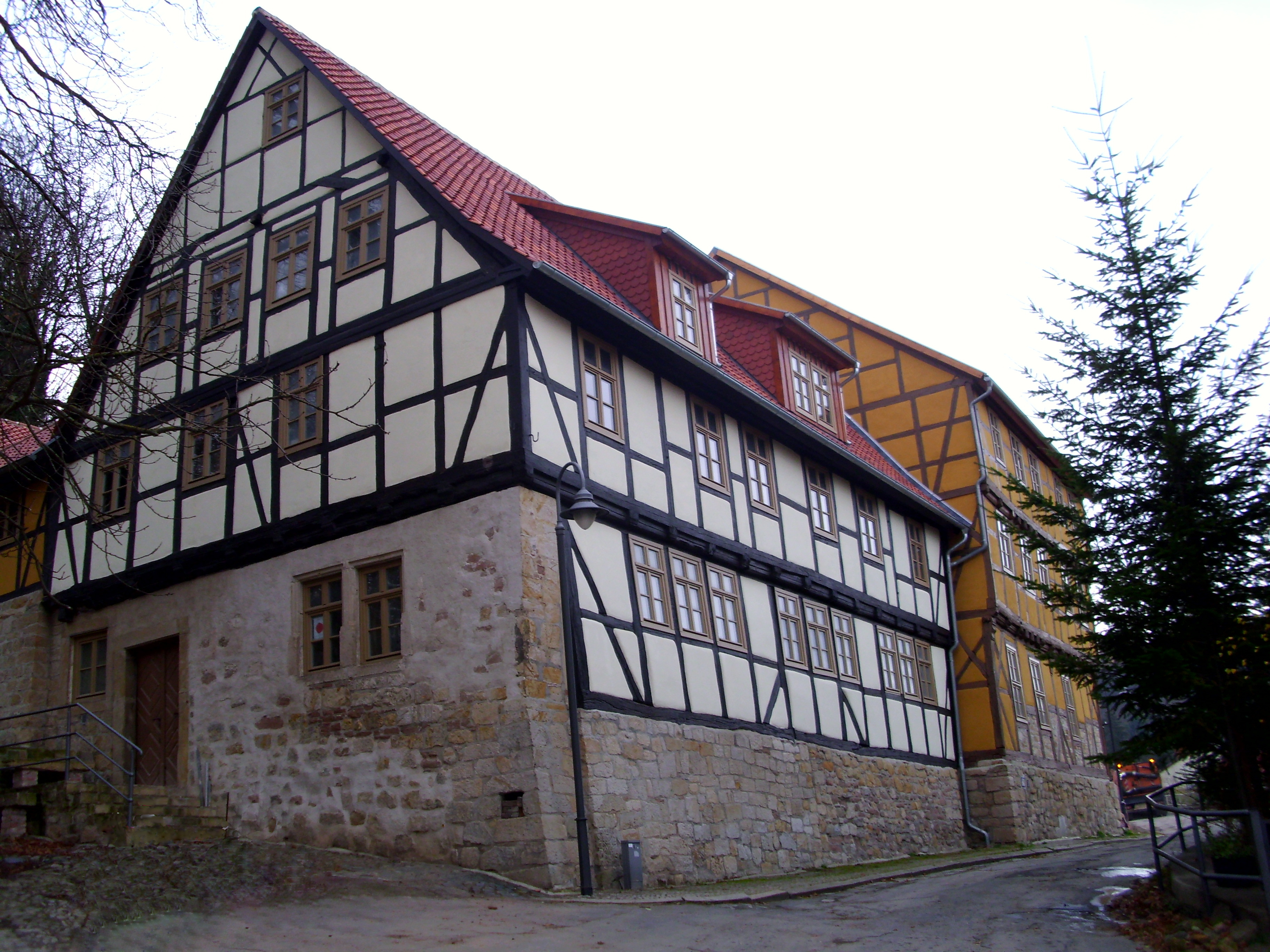 Alte Schule von 1620, 1677 in Blankenburg (Harz)